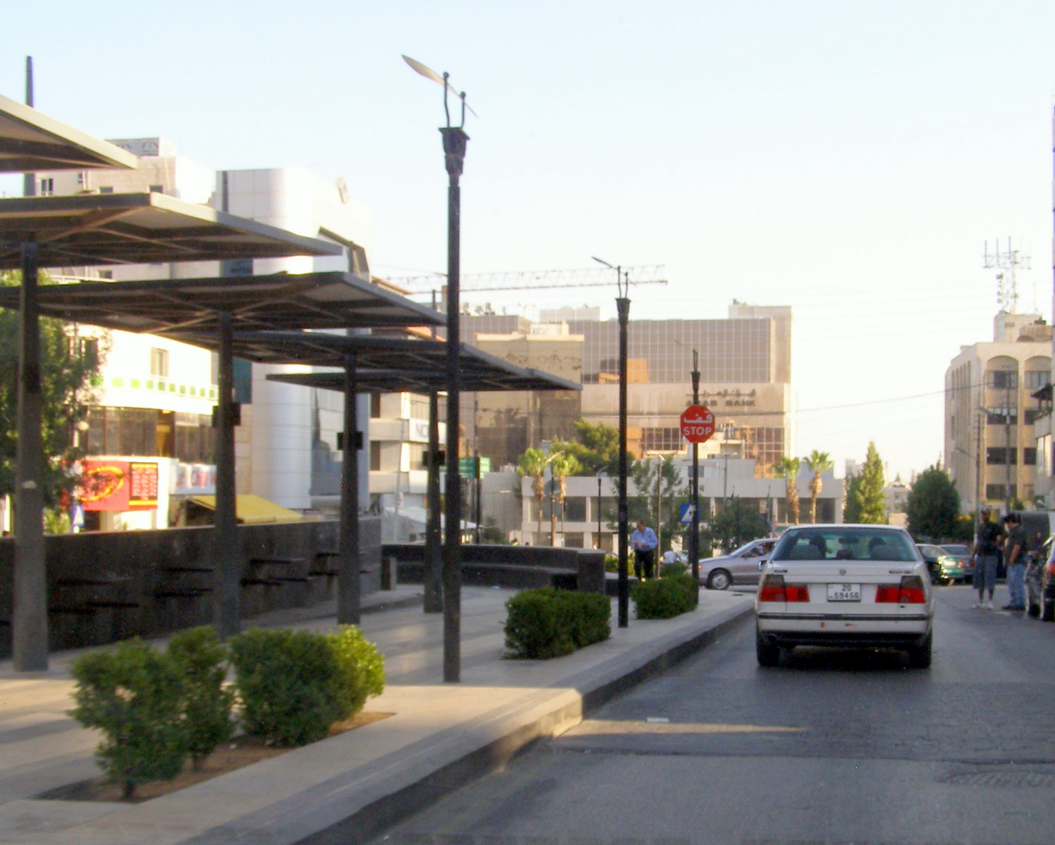 Thaqafa Street Amman شارع الثقافة (حي الشميساني) في عمّان